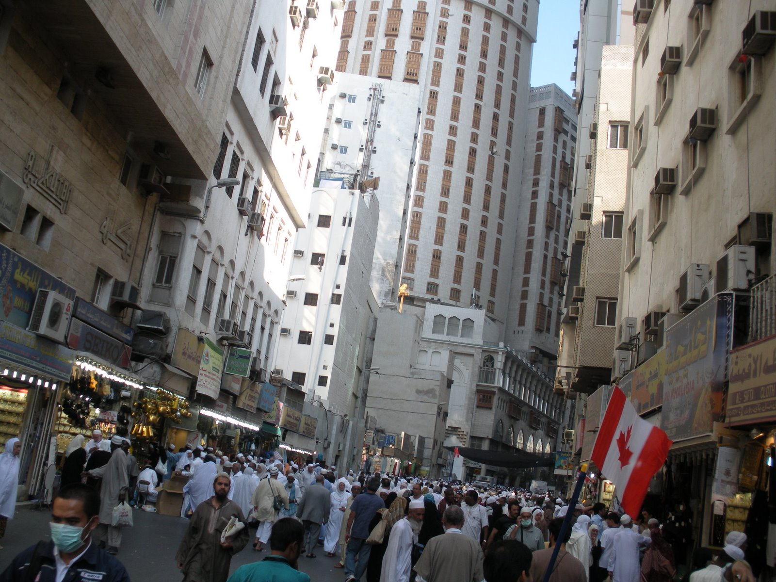 أحد شوارع مكة